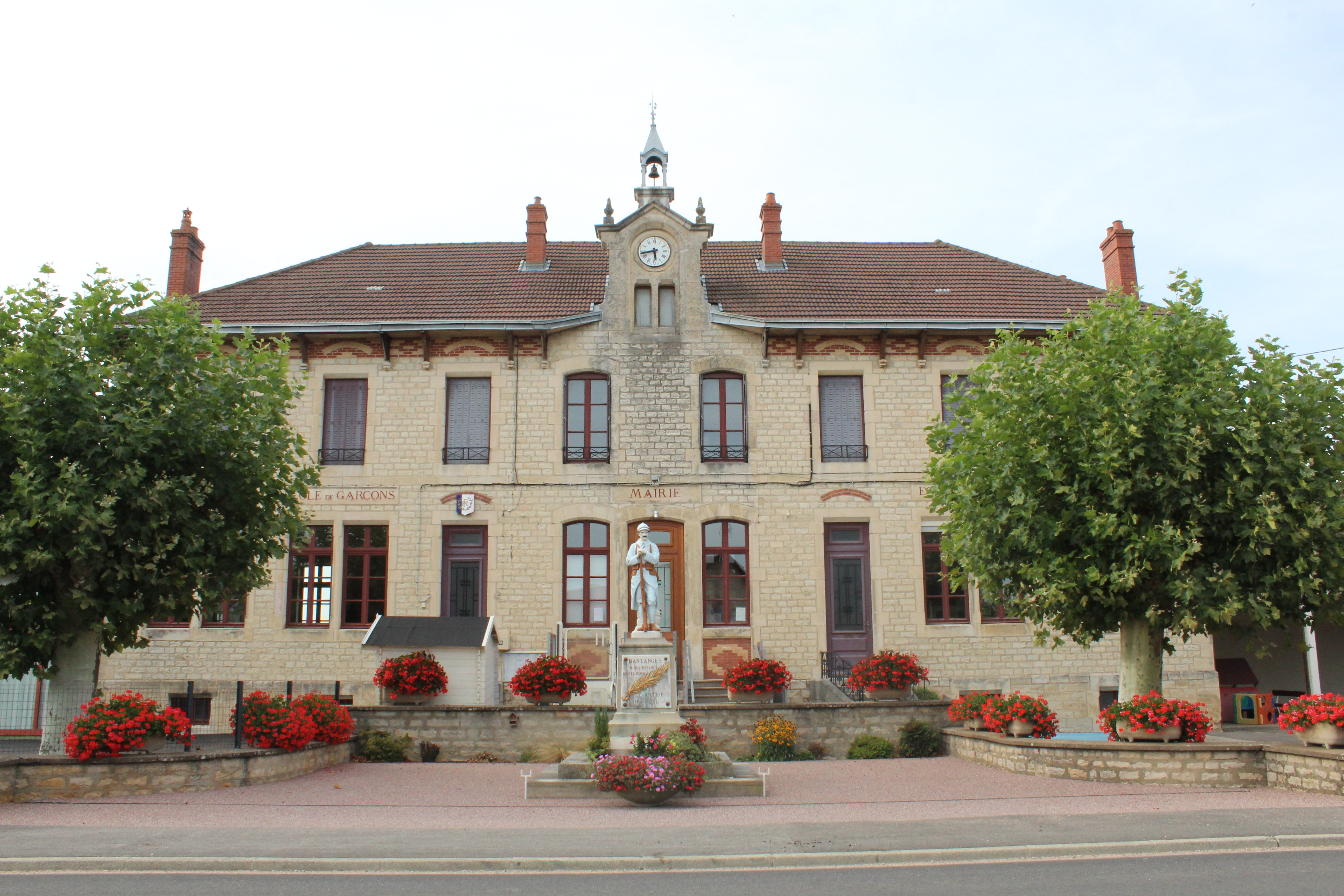 Mairie de Bantanges.